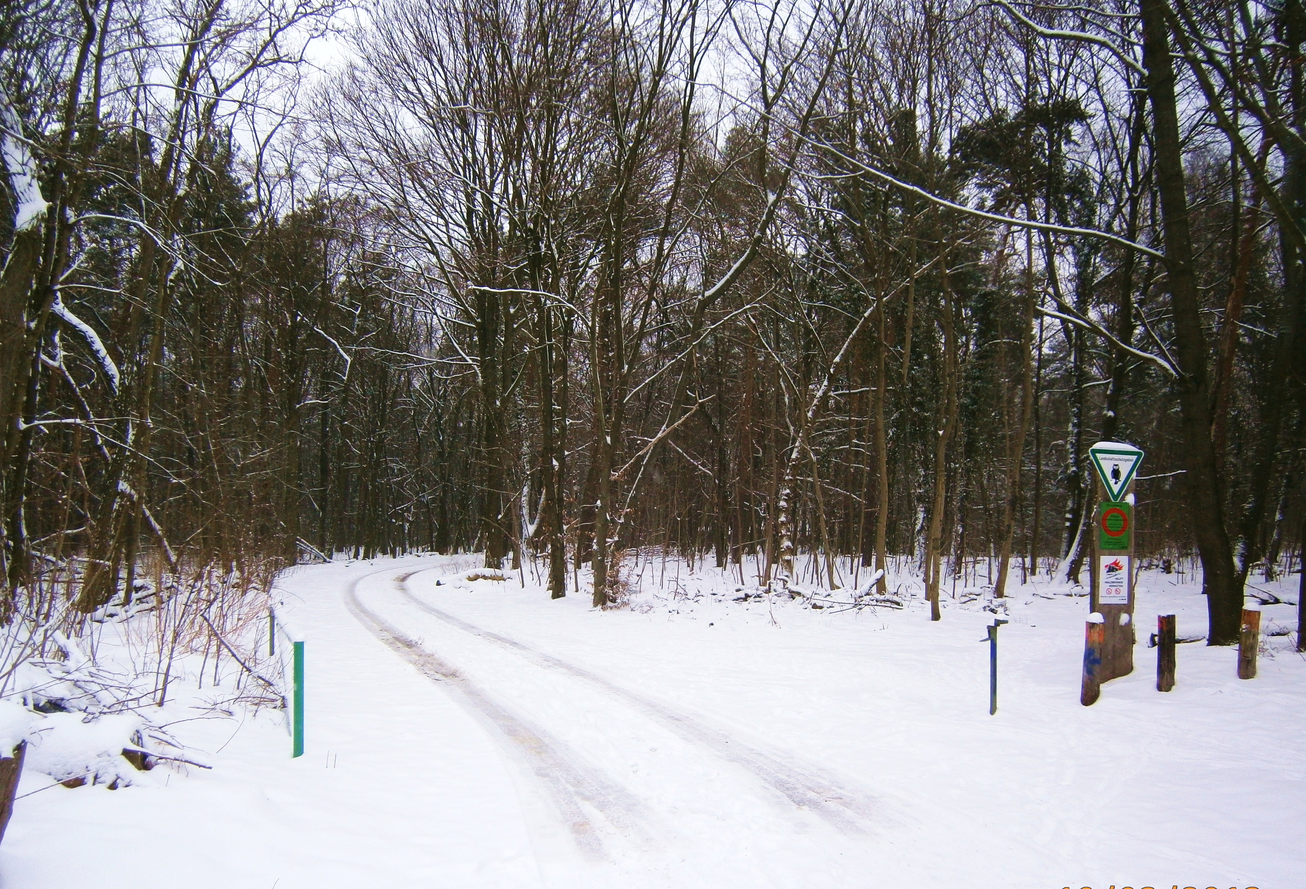 SchwarzerWeg ist eine Straße im Ortsteil Berlin-Tegel (hier Blickrichtung Nord aus Konradshöhe heraus)